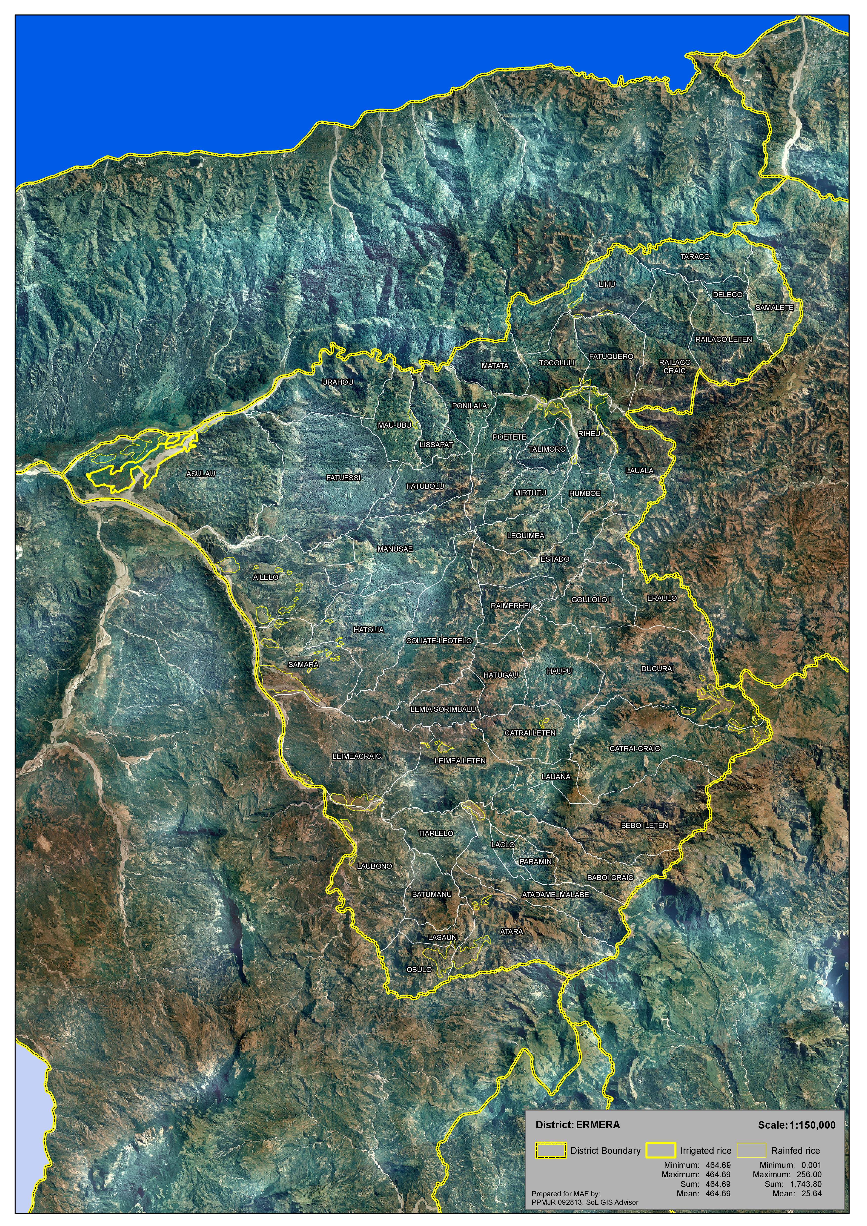 Reisfelder im Distrikt Ermera